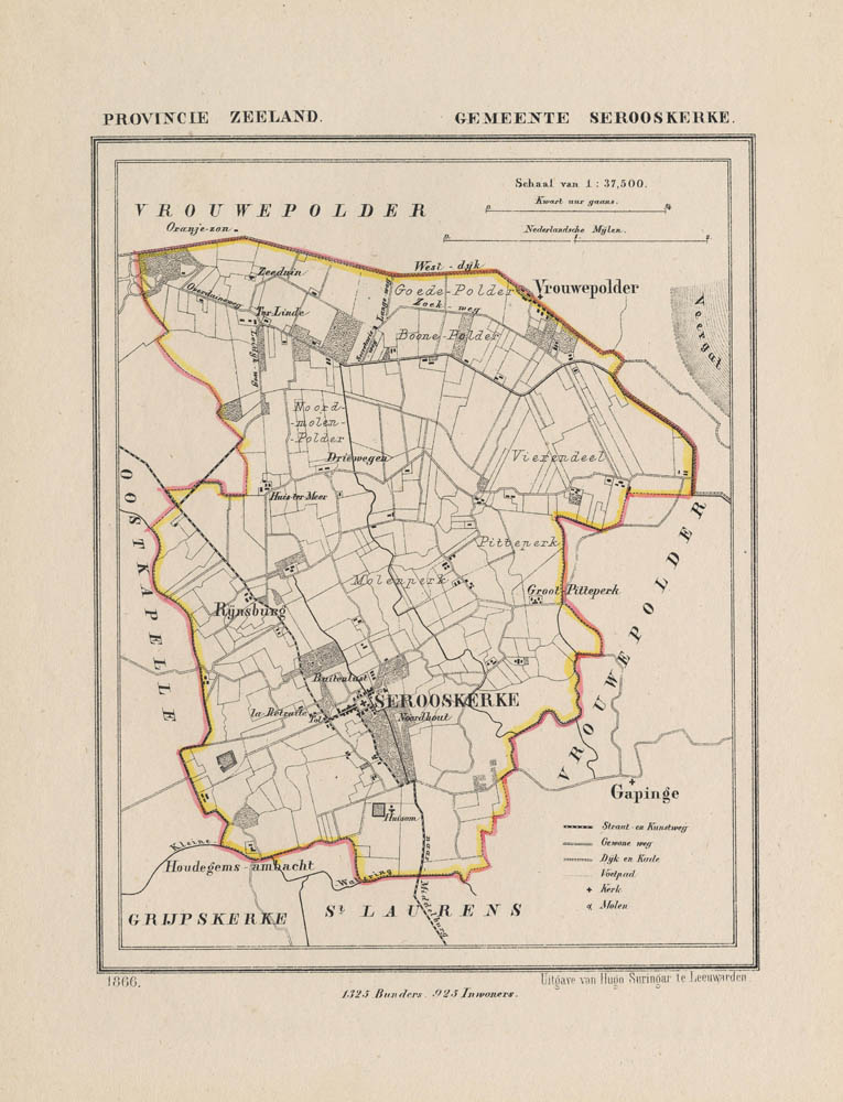 Kaart Serooskerke (Walcheren) 1866